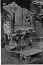 Henry VI.